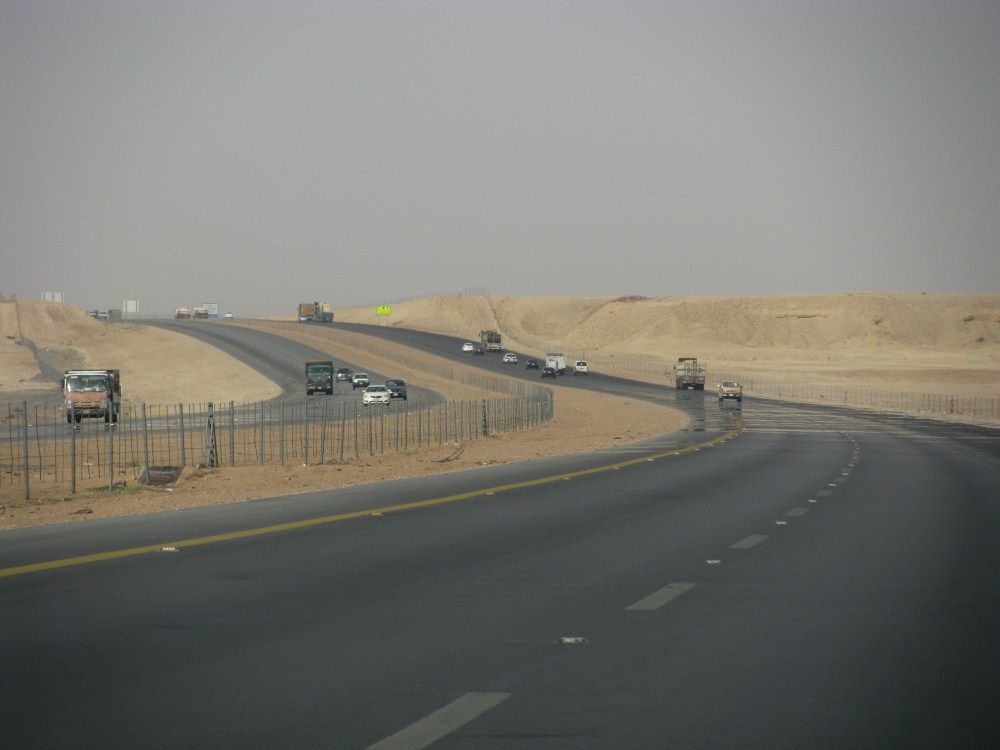 റിയാദിനെയും ദമ്മാമിനേയും ബന്ധിപ്പിക്കുന്ന ദേശീയപാത